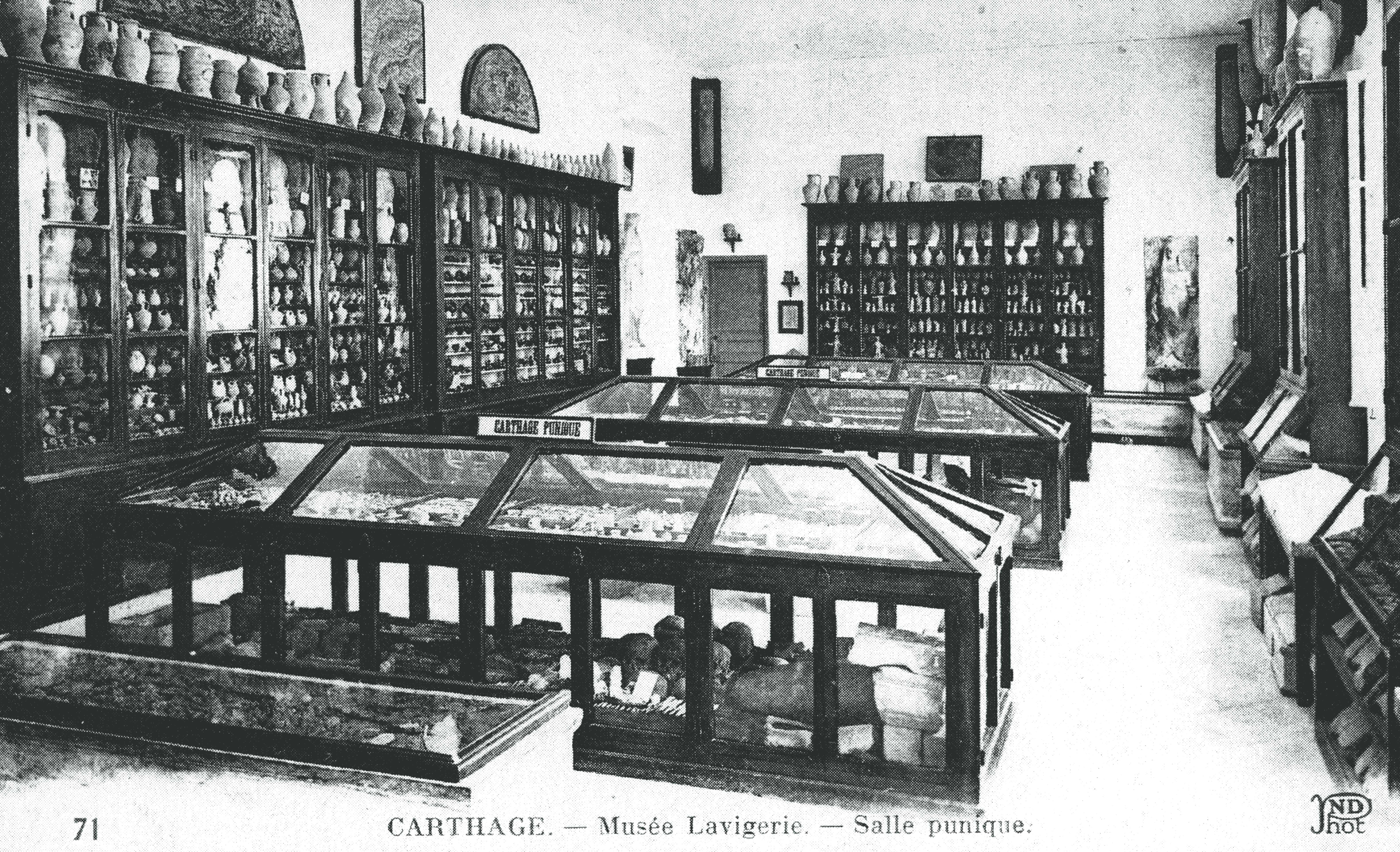 Ancienne carte postale du Musée Lavigerie Carthage